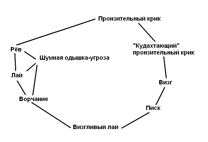 Типичные крики, издаваемые макаками-резусами в различных эмоциональных состояниях. Линиями соединены те виды сигналов, между которыми были обнаружены звуки промежуточного характера. По книге В. П. Морозова "Занимательная биоакустика", 1987.